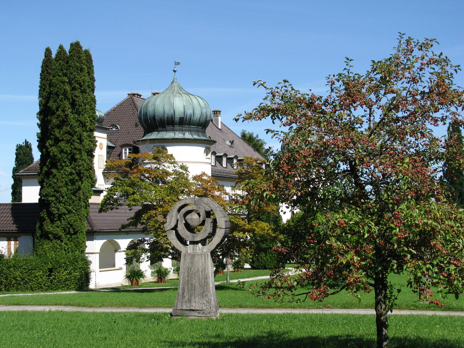 Schloss Höhenried, Schlosspark. Skulptur von Karlheinz Hoffmann.